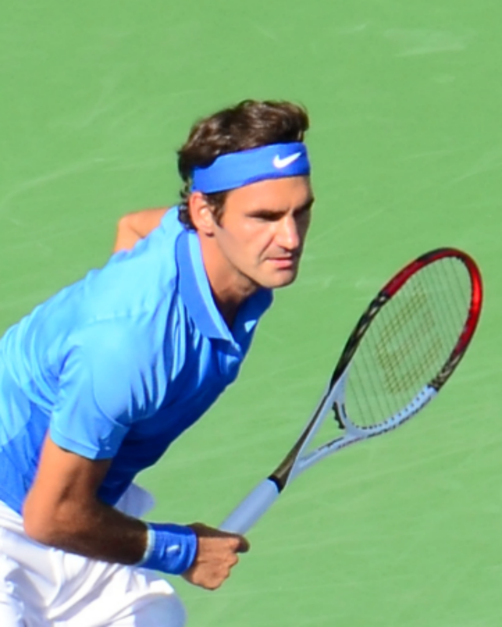 Roger Federer